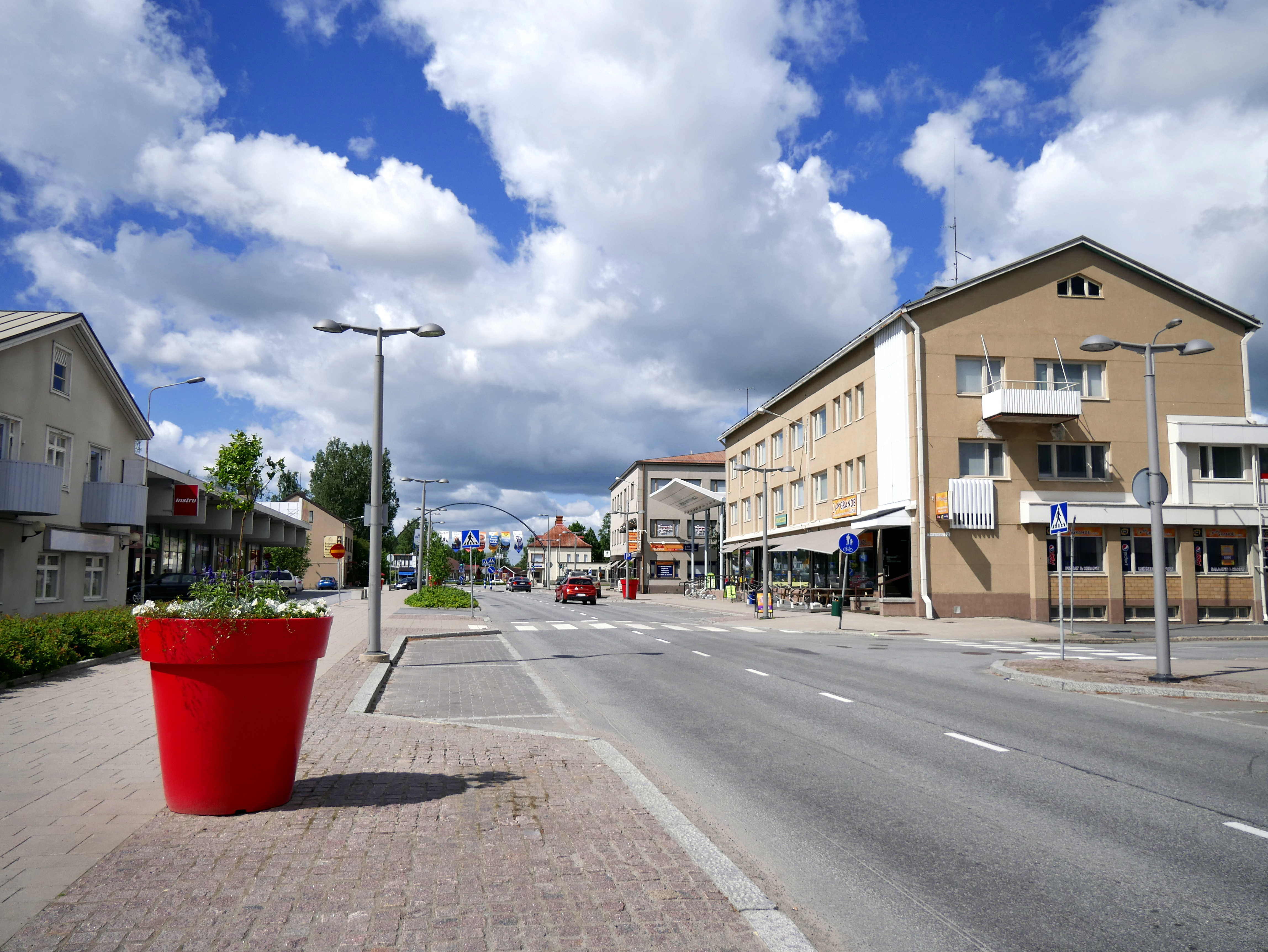 Kauppakatua Lapuan keskustassa.